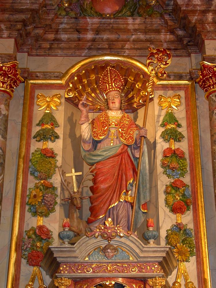 Haupeschkierch zu Munzen: D'Statu vum Hl. Hubertus an der Munzer Kierch.